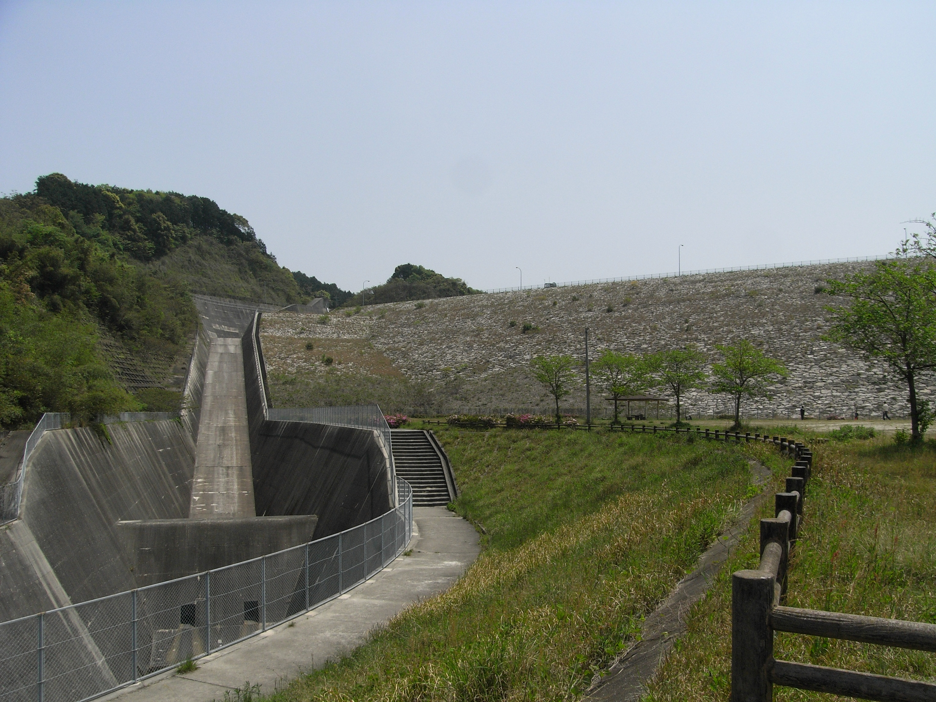 Dam